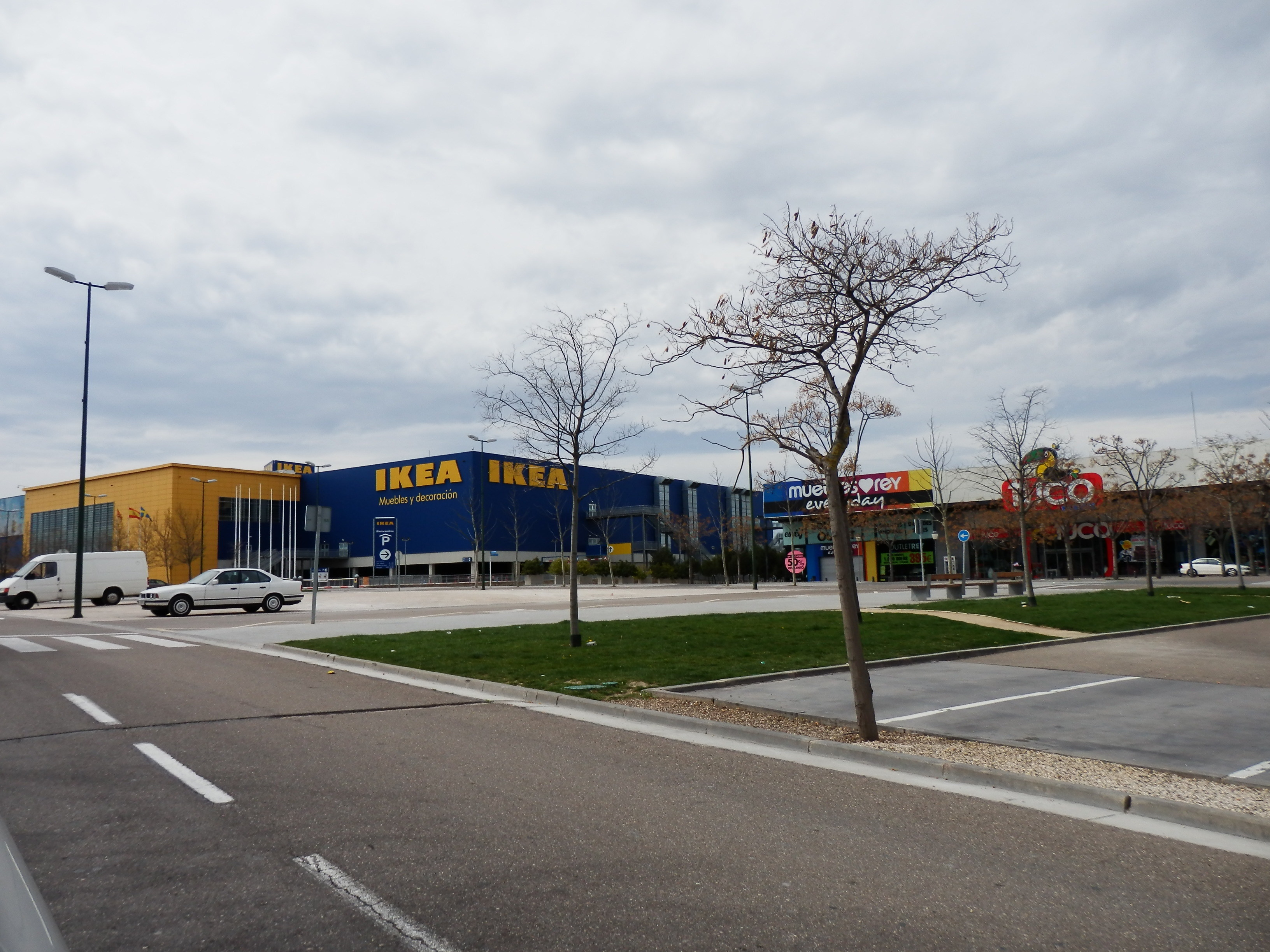 Ikea en Puerto Venecia de Zaragoza.